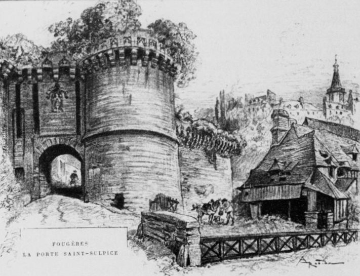 Fougères : la Porte Saint-Sulpice (lithographie d'Albert Robida publiée dans "La vieille France, Bretagne" vers 1900)